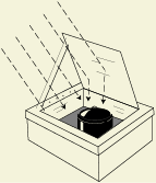 Kut upada Sunčevih zraka